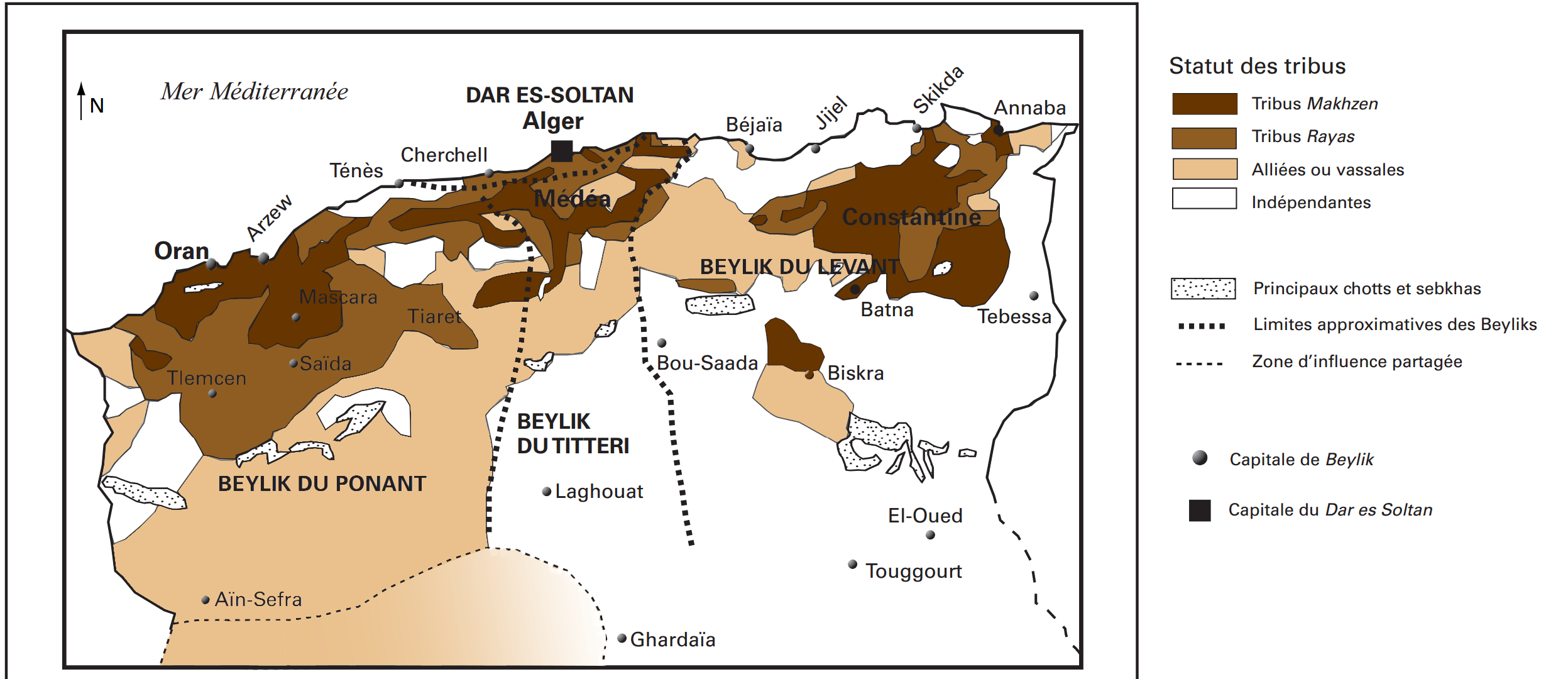 Le maghreb central sous suzerainté ottomane, Yaël Kouzmine, basés sur les travaux de L. Rinn